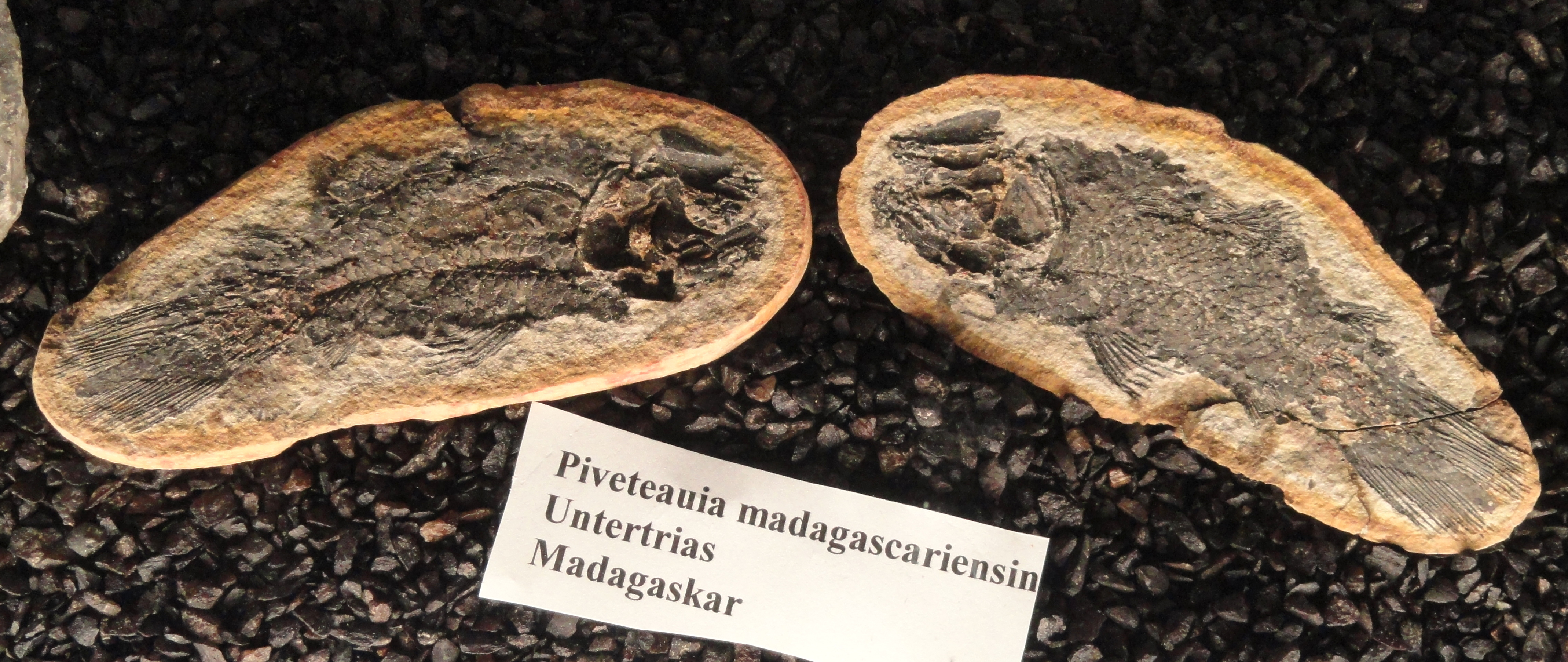 Exhibit in Naturmuseum Senckenberg, Frankfurt am Main, Germany.